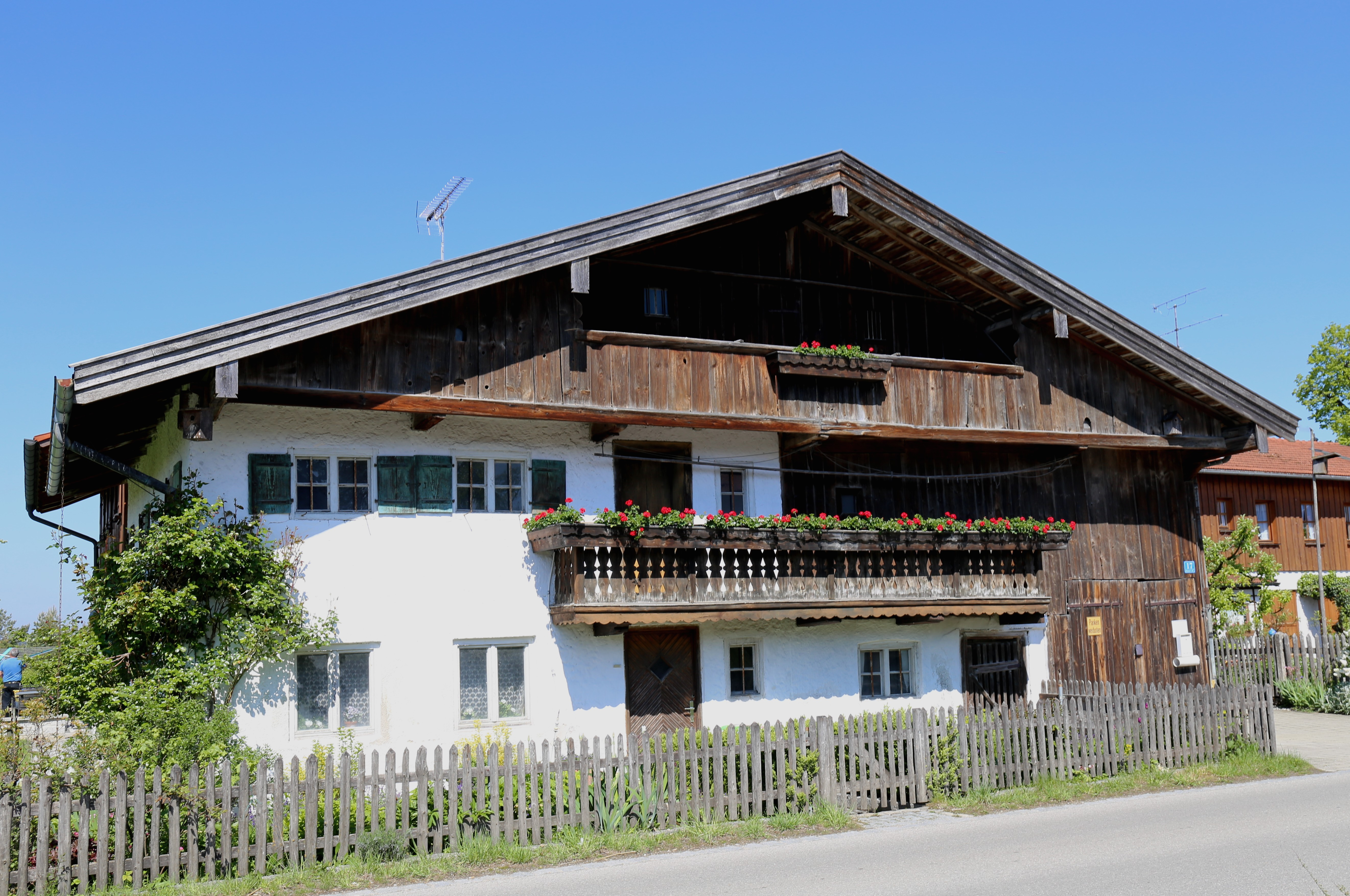 Münchener Straße 17, Aying; Wohnteil der ehemaligen Schäfflerei und des Einfirsthofes Schäffler, zweigeschossiger überwiegend verputzter Blockbau mit Hochlaube und flachem Satteldach, im Kern 17. Jahrhundert